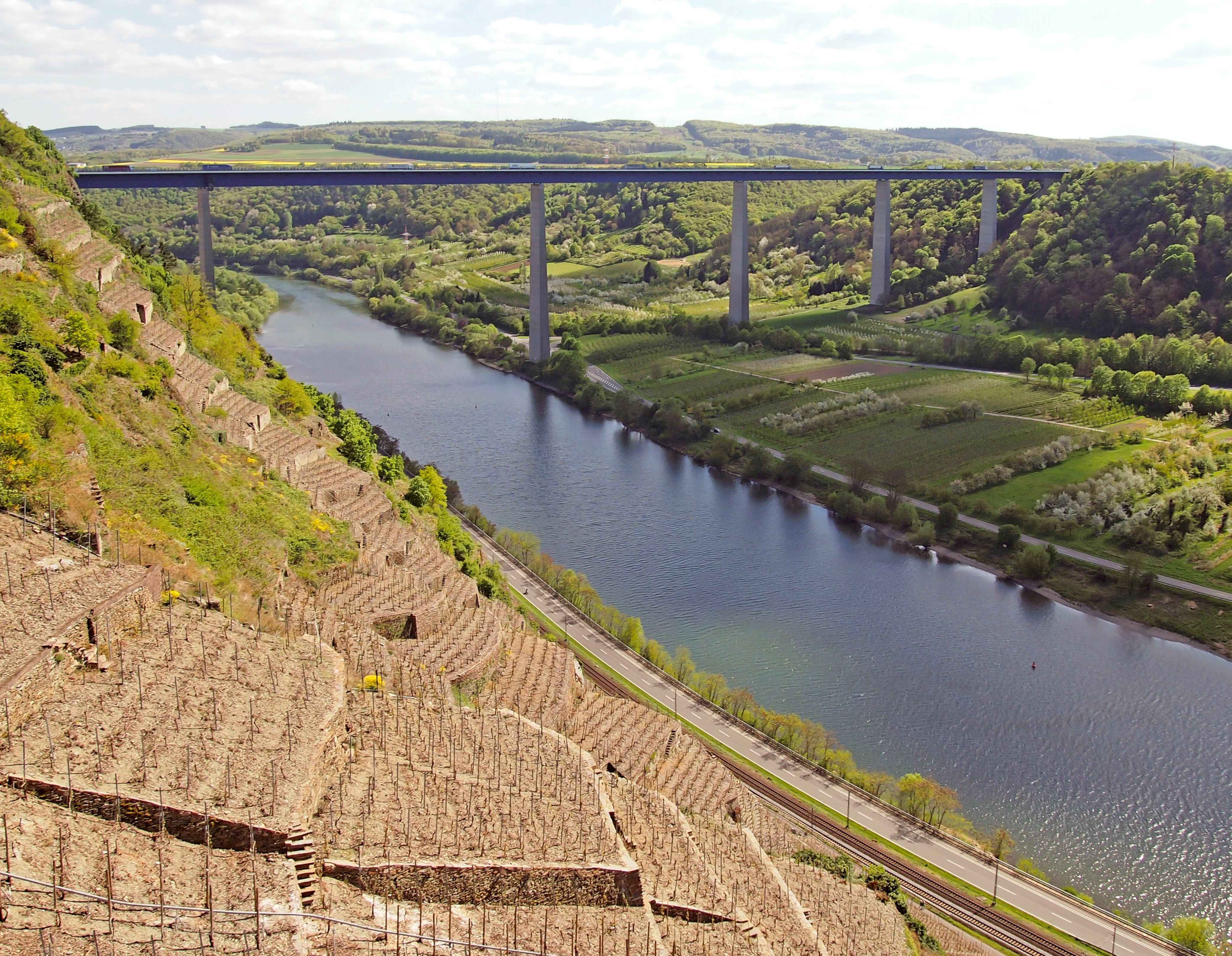 Beim Bau der Großbrücken der Bundesautobahn A61 war die harmonische Einbindung von Technik und Landschaft eine wichtige Vorgabe der Planer. Die A61 überquert die Mosel zwischen Winningen und Dieblich.